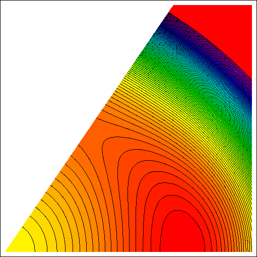 Potencial nuclear en término de coordenadas colectivas. El potencial es usado en modelos nucleares como el MVR (modelo vibracional y rotacional nuclear).